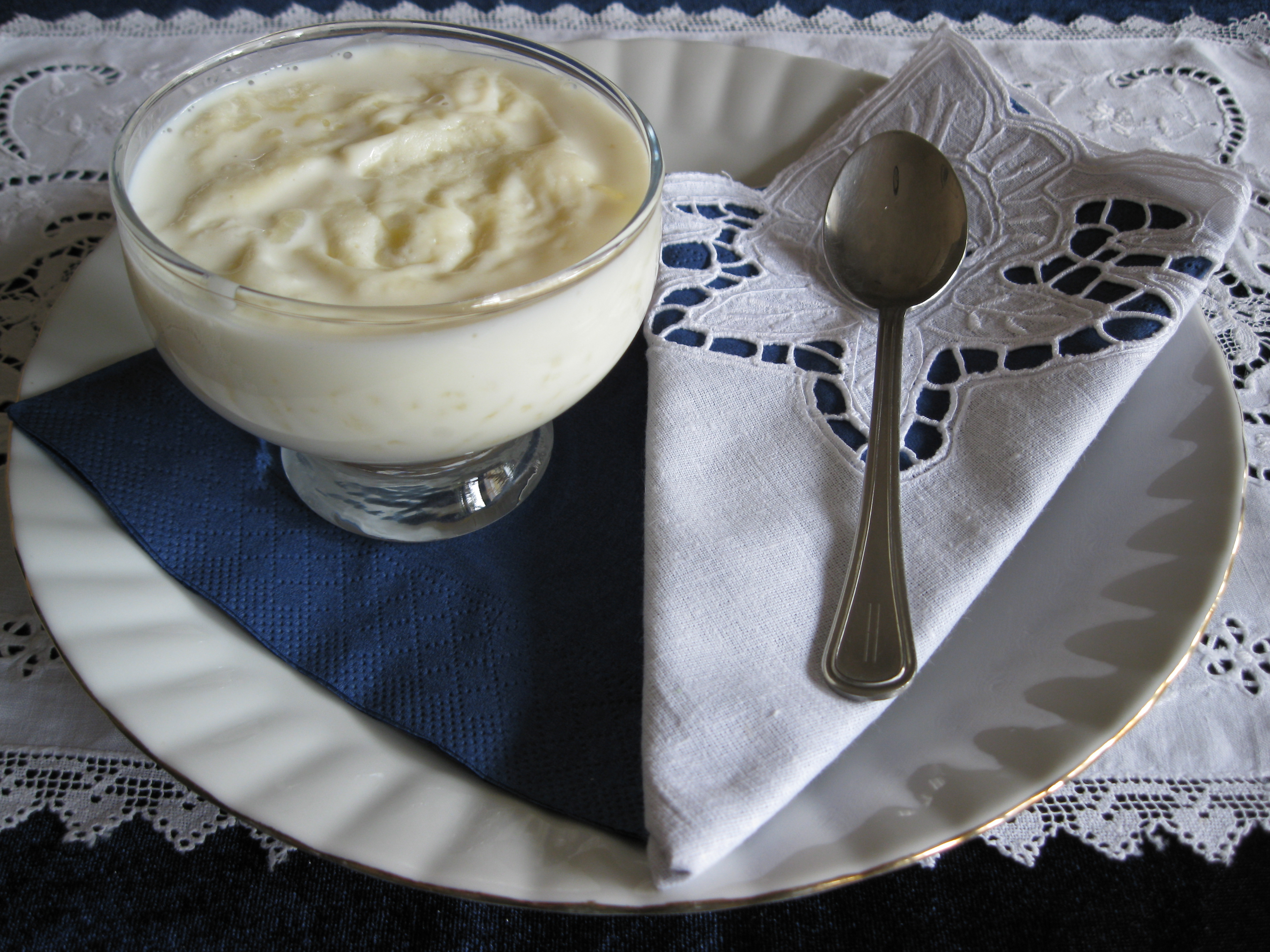 Tambëlorizi – Tambëlorizi është ëmbëlsirë freskuese e cila zakonisht përgatitet për festa të ndryshme.